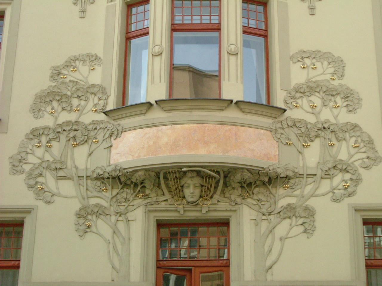 Fasáda secesního hotelu Central v Praze